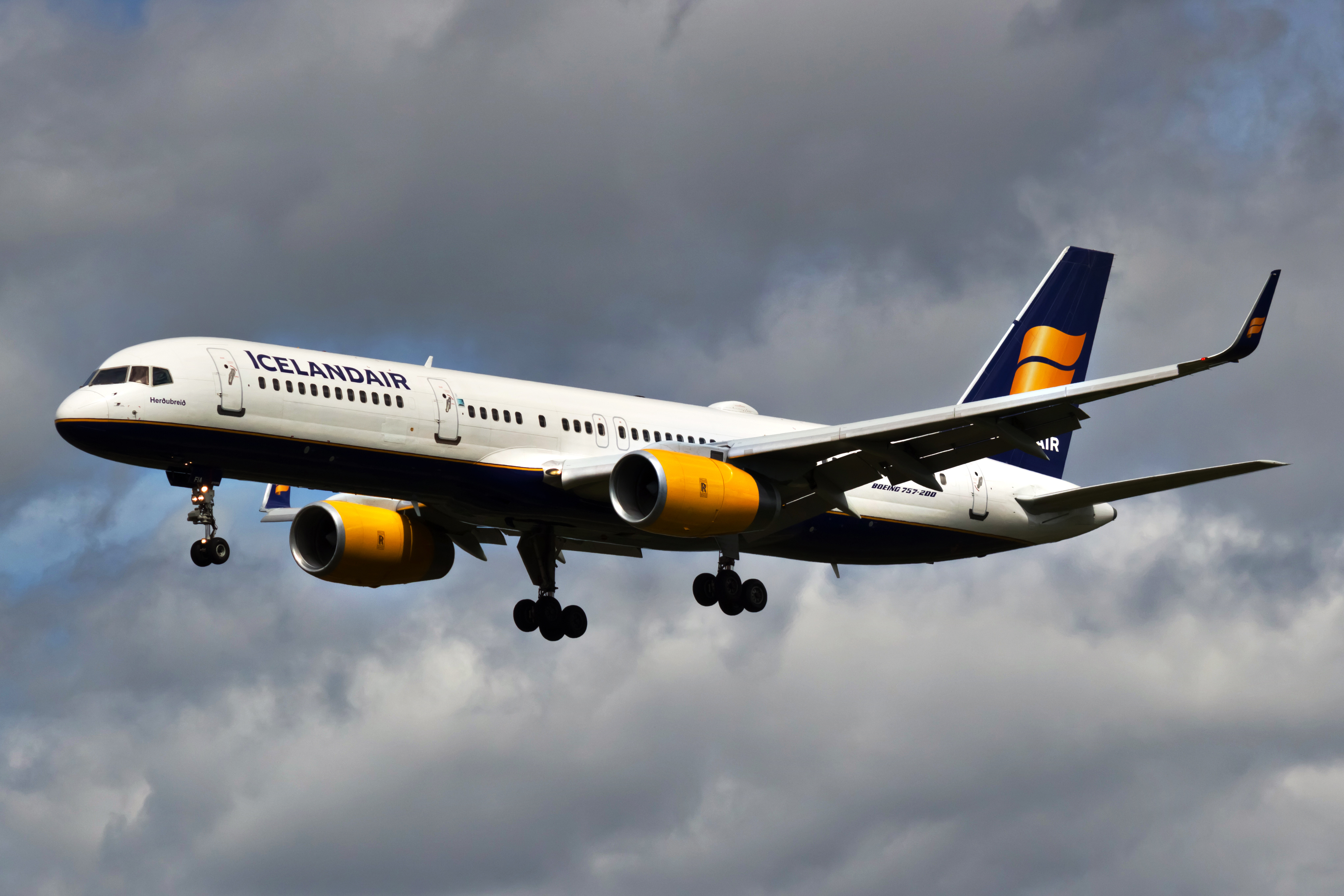 Boeing 757 de Icelandair no aeroporto de Estocolmo-Arlanda.